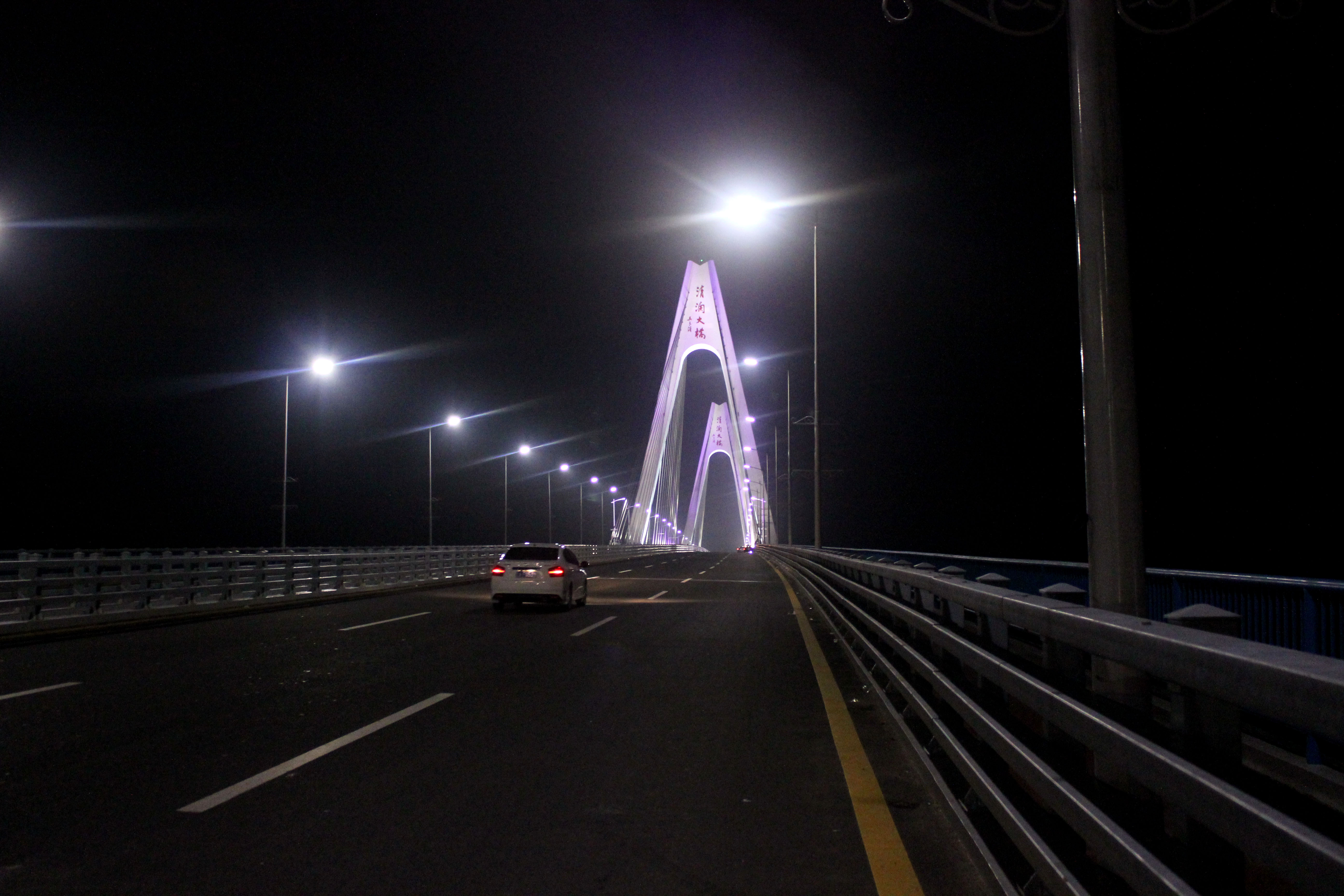 中国海南省文昌市清澜大桥。拍摄于大桥西端。